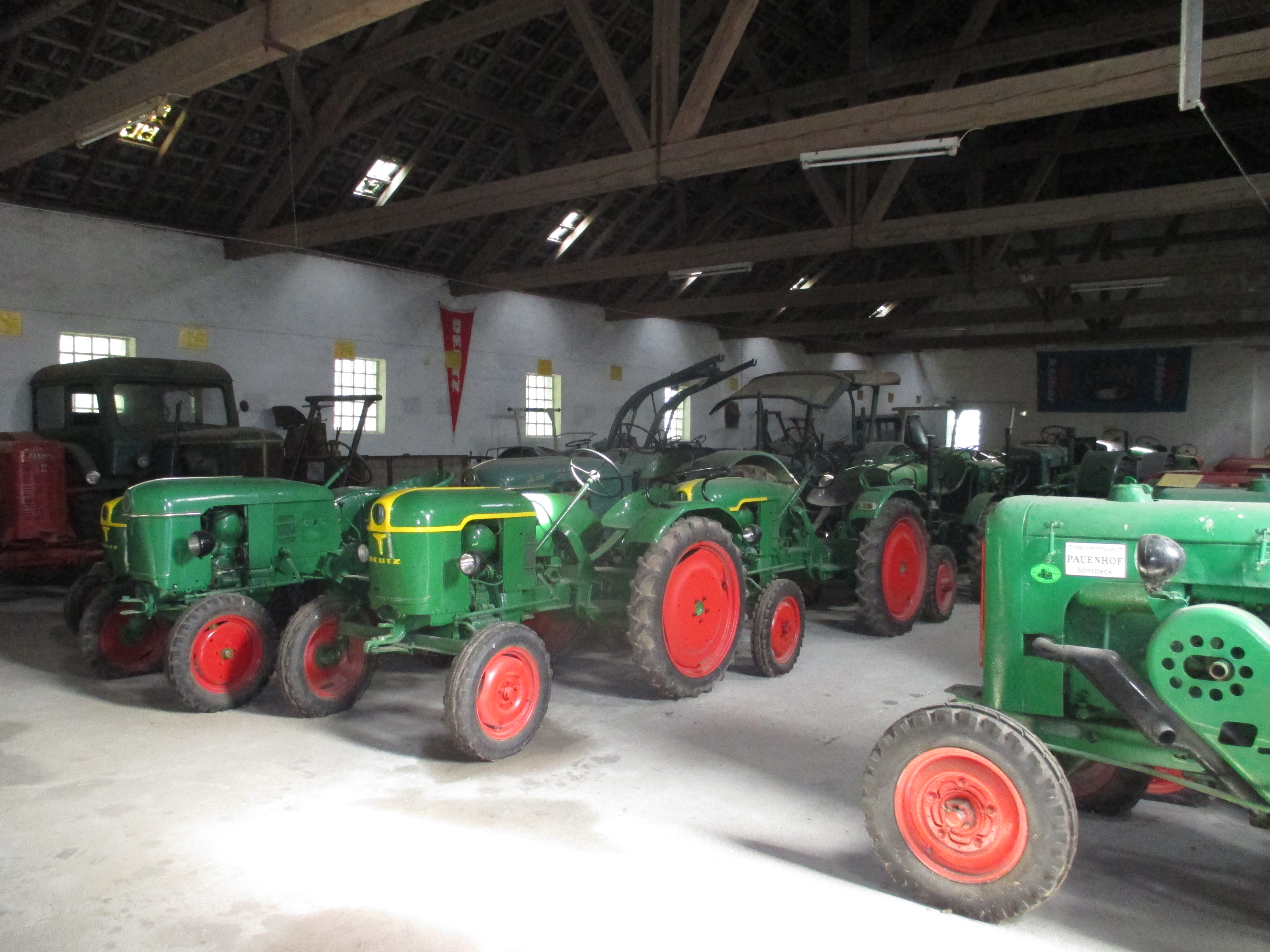 Das Traktorenmuseum Pauenhof beherbergt die größte Sammlung von Traktoren und Landmaschinen in Deutschland.